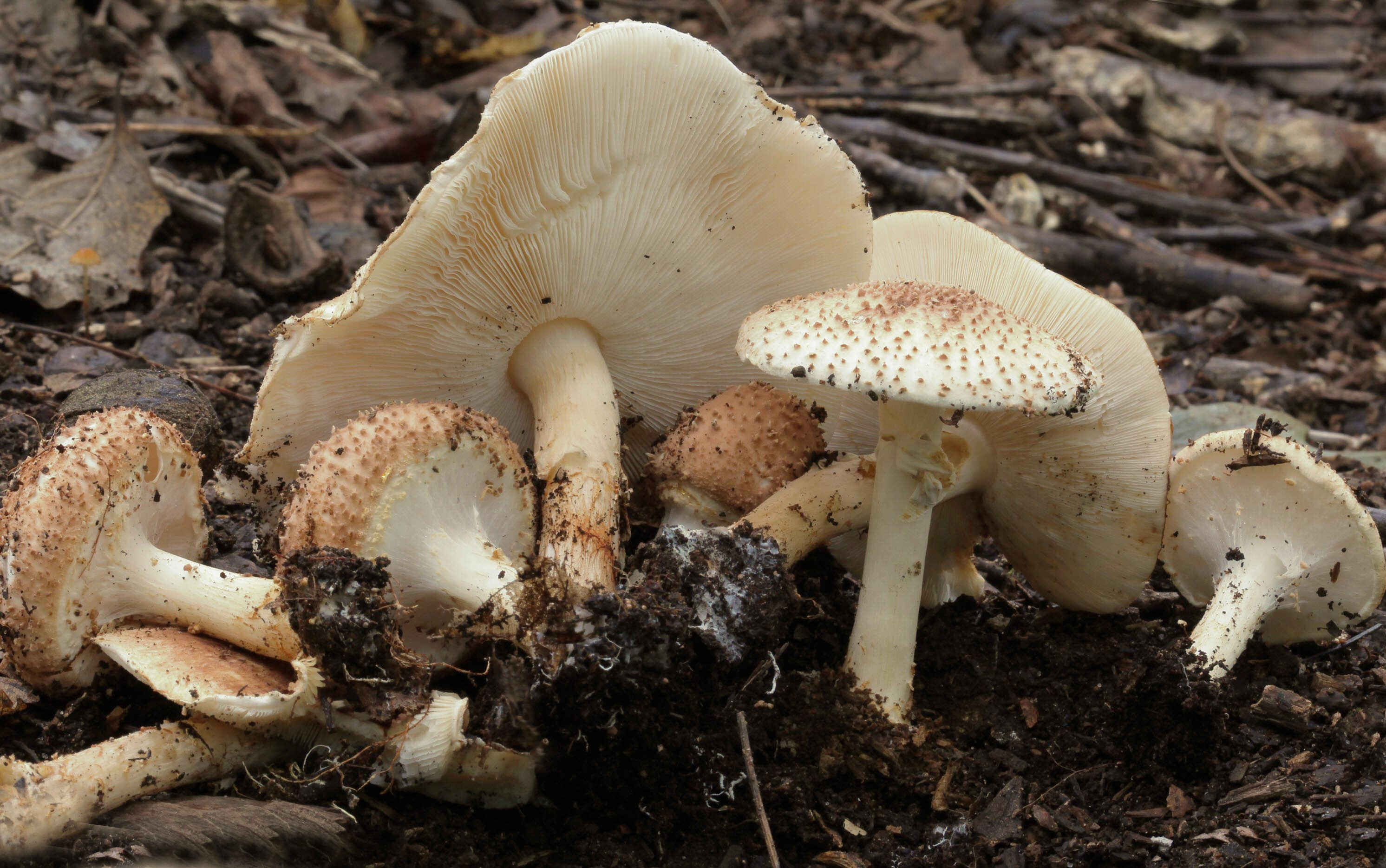 Lepiota aspera (Pers.) Quél.